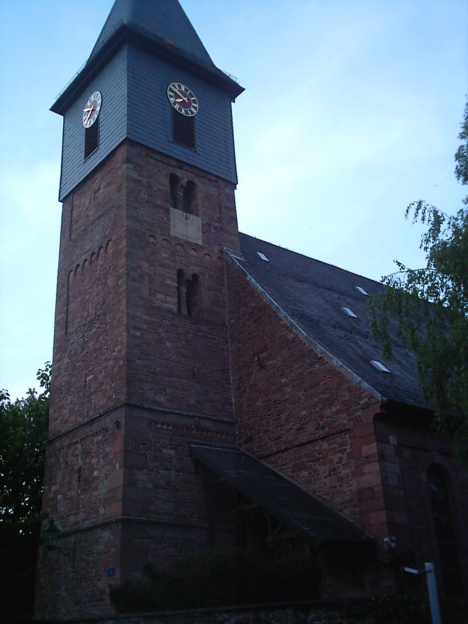 Grünwettersbach, Stadtteil von Karlsruhe (Baden). Evangelische Kirche, Kirchturm